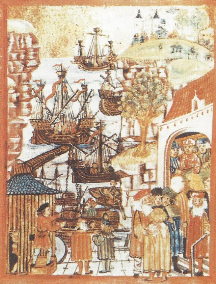 „Deutscher“ oder Peterhof (Nowgorod)